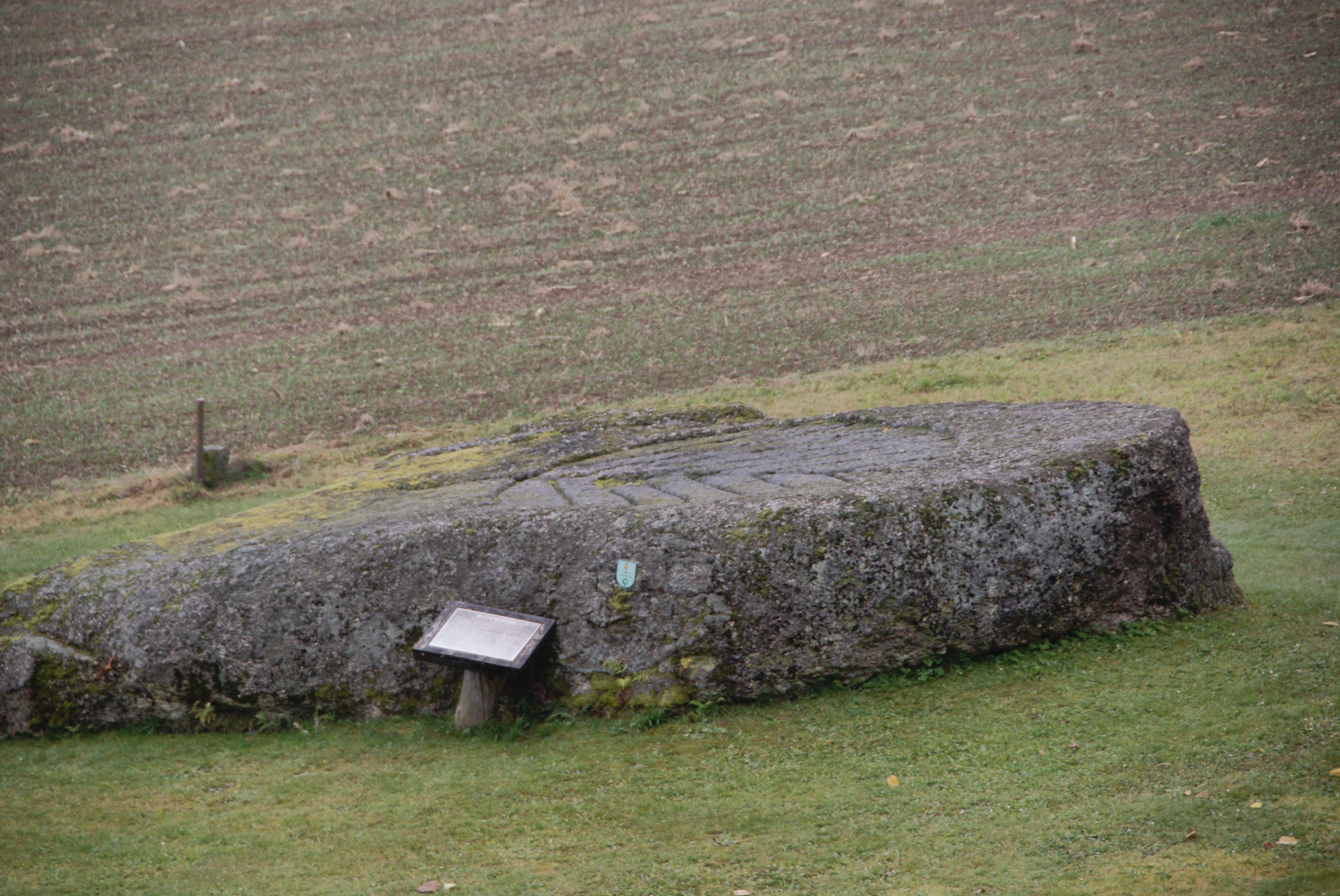 Pechölstein in Hundsberg bei Gutau Object location48° 24′ 18.84″ N, 14° 35′ 27.45″ E